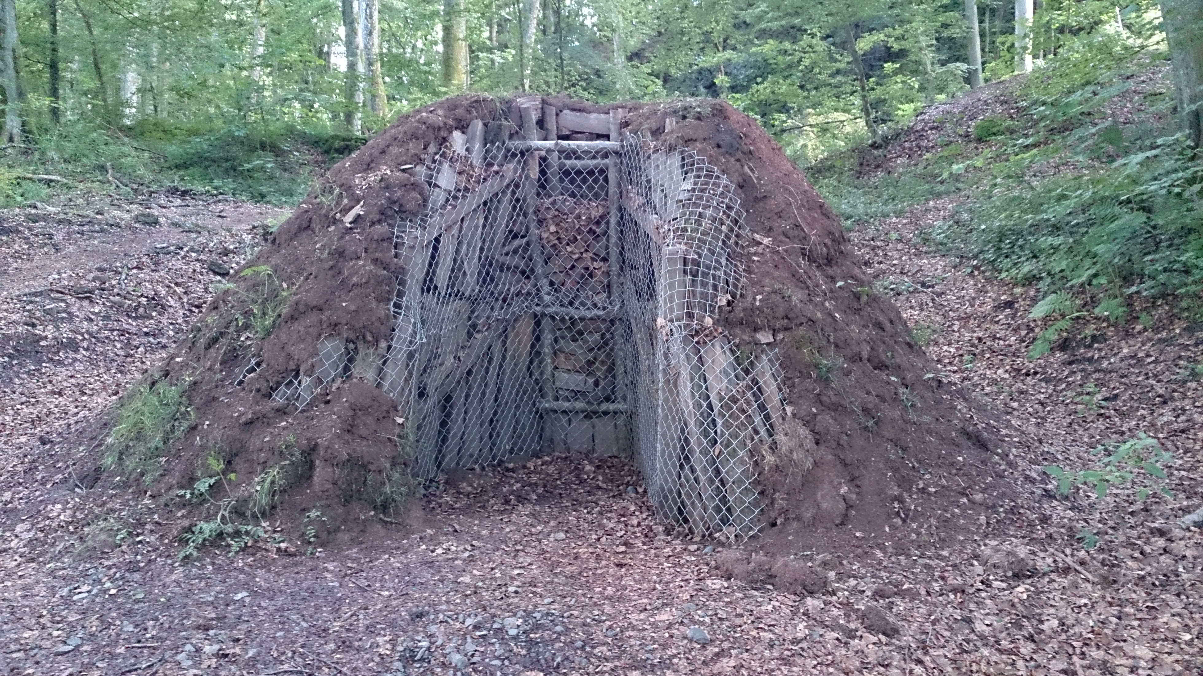 Querschnitt eines Kohlenmeilers; aufgebaut vor den Birresborner Eishöhlen